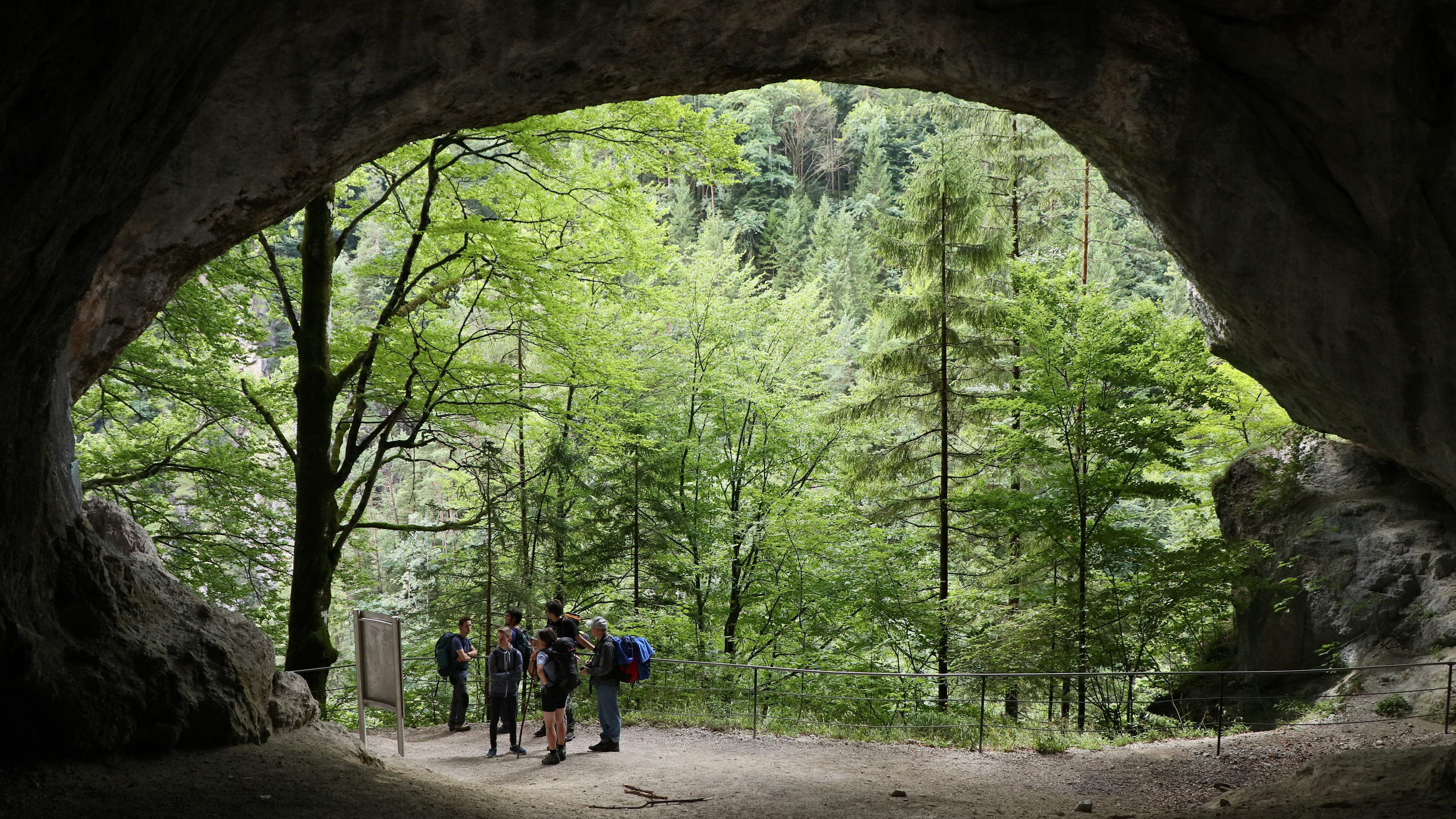 Blick aus der Tischoferhöhle ins Naturschutzgebiet Kaisergebirge